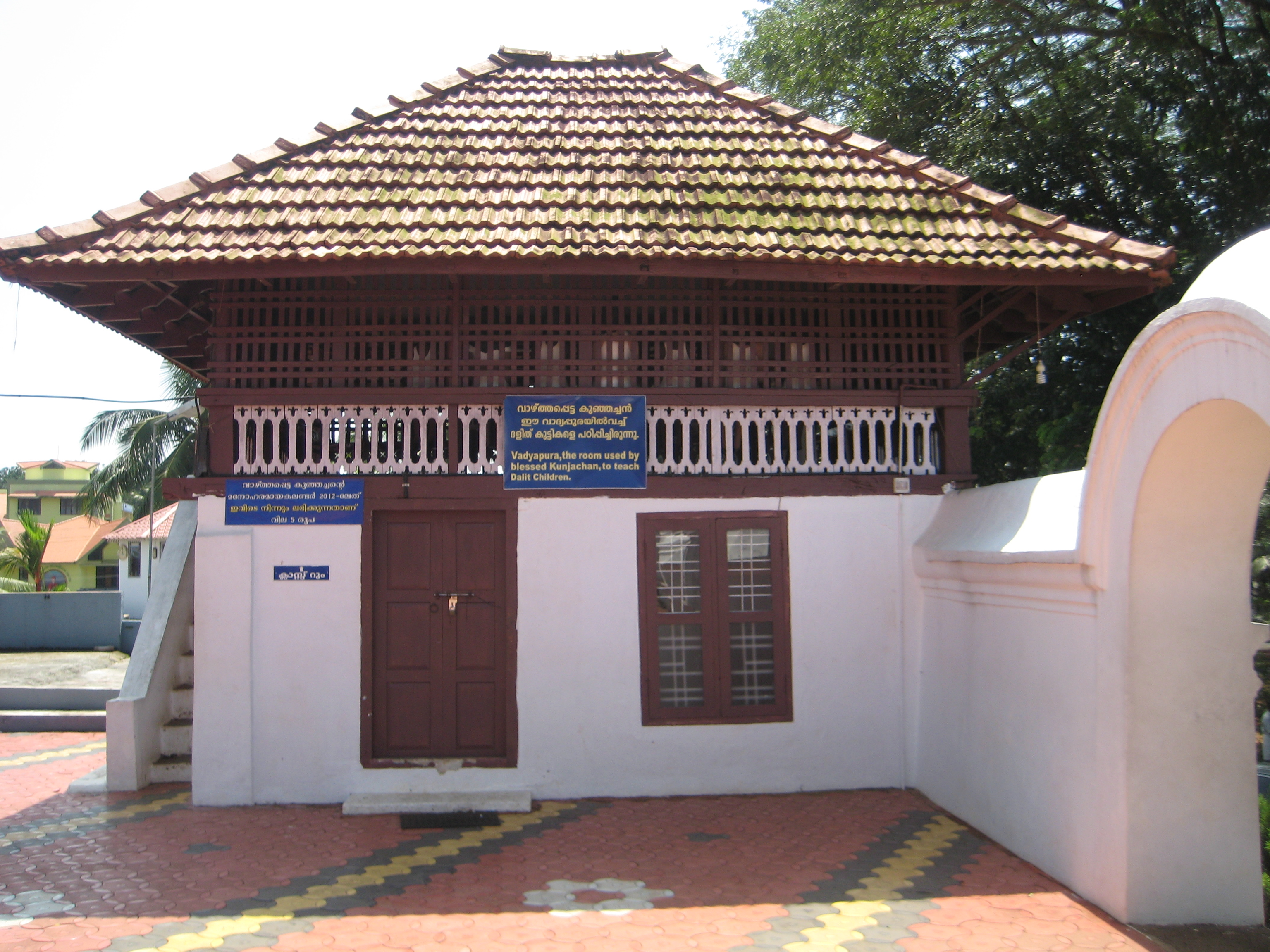 കോട്ടയം ജില്ലയിൽ മീനച്ചിൽ താലൂക്കിൽ കുറവിലങ്ങാടിനടുത്ത് രാമപുരം പട്ടണത്തിന് അഭിമുഖമായി കാണുന്ന അതിപുരാതനമായ രണ്ടു പള്ളികളാണ് സെന്റ് ആഗസ്ത്യൻസ്, സെന്റ് മേരീസ് പള്ളികൾ. പണ്ട് കാലത്ത് ദളിത് വിദ്യാർത്ഥികളെ വിദ്യാലയങ്ങളിൽ പ്രവേശിക്കുന്ന പതിവുണ്ടായിരുന്നില്ല. ഈ പള്ളിയോട് ചേർന്ന് രണ്ടു നിലകളിലായി സ്ഥിതിചെയ്യുന്ന കെട്ടിടത്തിൽ ഇതേ ഇടവകാംഗമായിരുന്ന കുഞ്ഞച്ചൻ ദളിത് വിദ്യാർത്ഥികളെ പഠിപ്പിച്ചിരുന്നതായി കാണുന്നു.